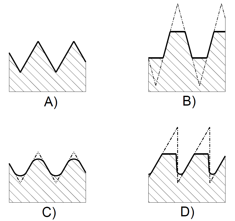 Algunos de los perfiles de rosca existentes.